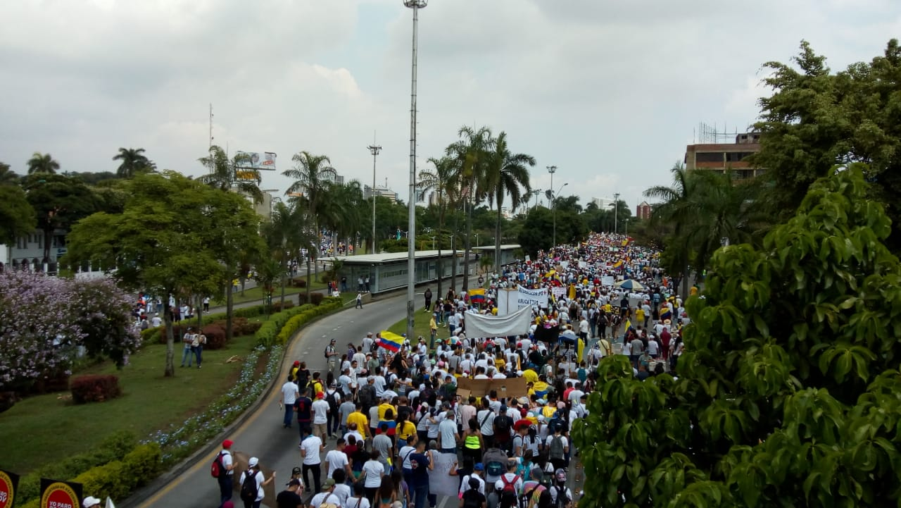 Paro Nacional en Colombia de 2019